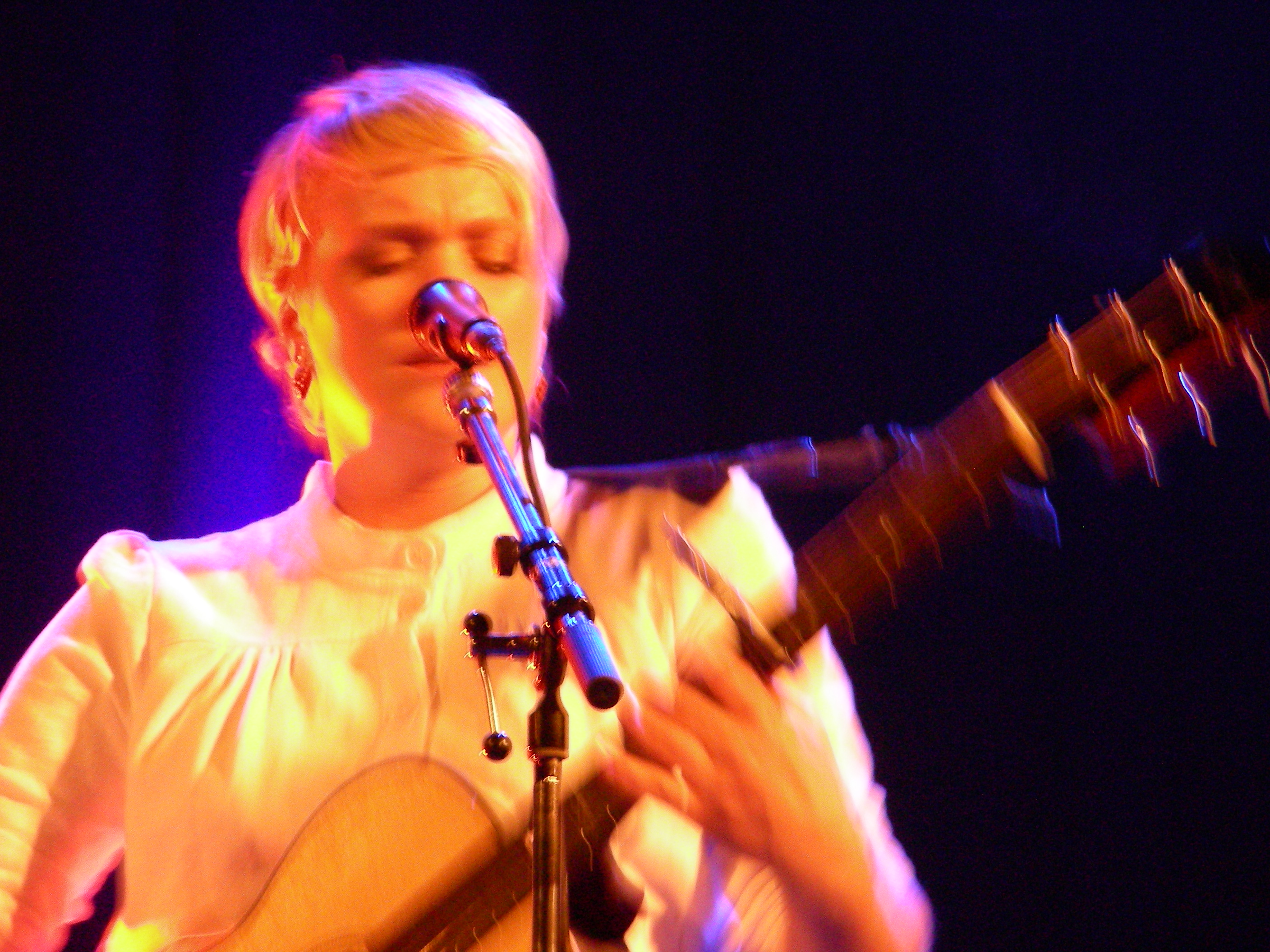 Ane Brun